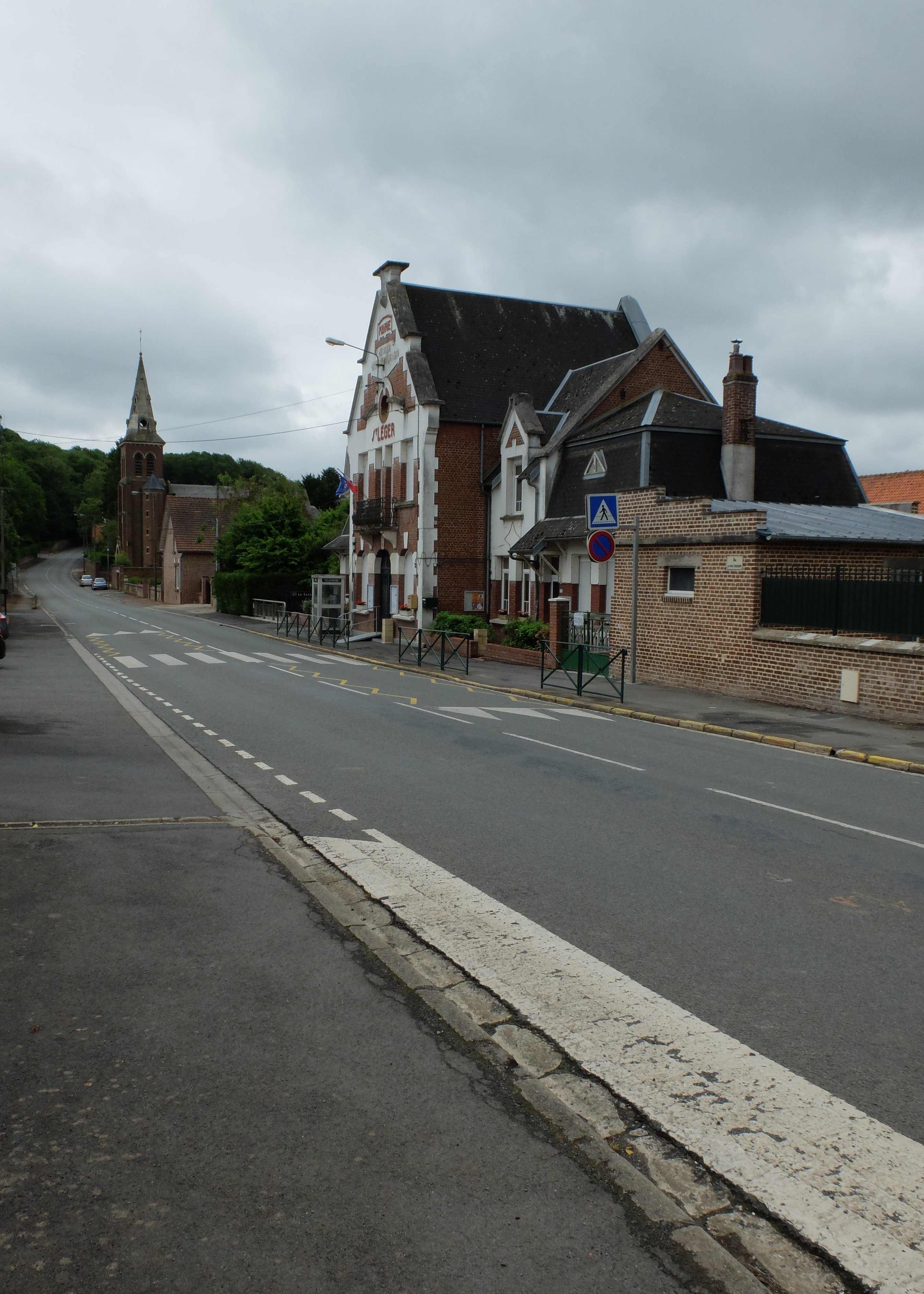 Vue de la rue de Vaulx-Vraucourt de Saint-Léger (Pas-de-Calais). On peut voir la mairie et l'église Saint-Léger.